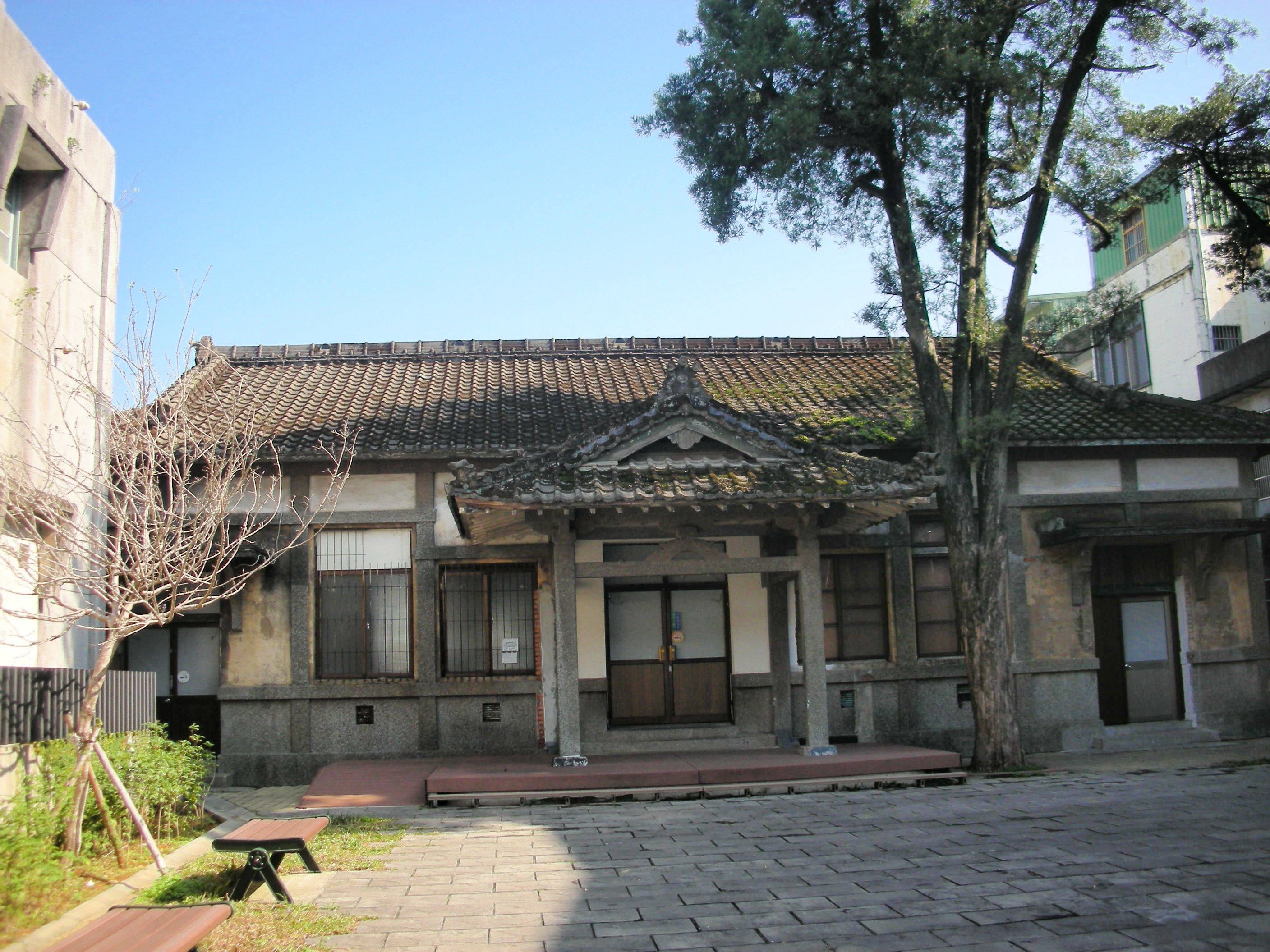 中文（新加坡）: 龍潭武德殿